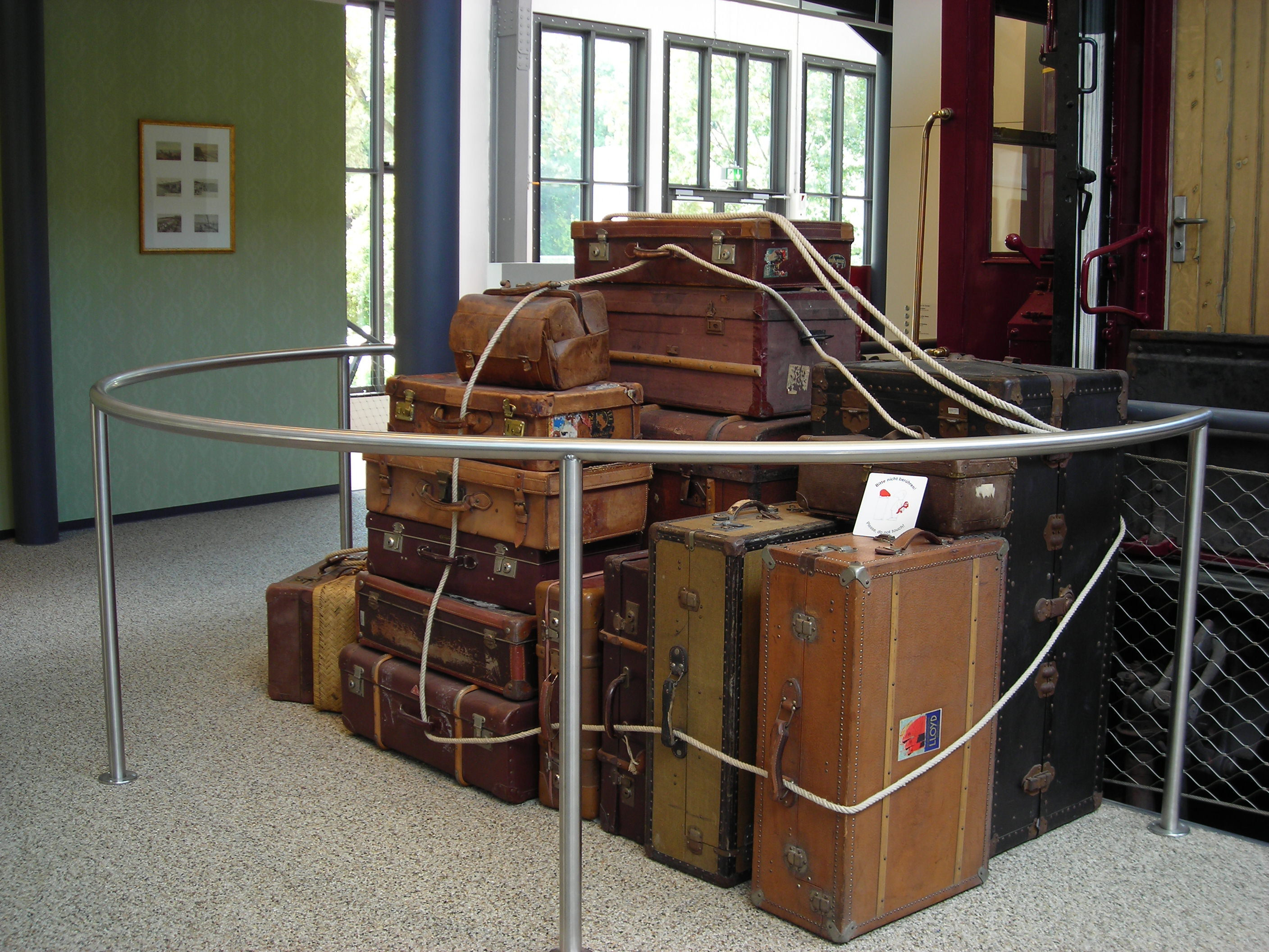 Historische Gepäckstücke, Exponate im Deutschen Museum Verkehrszentrum